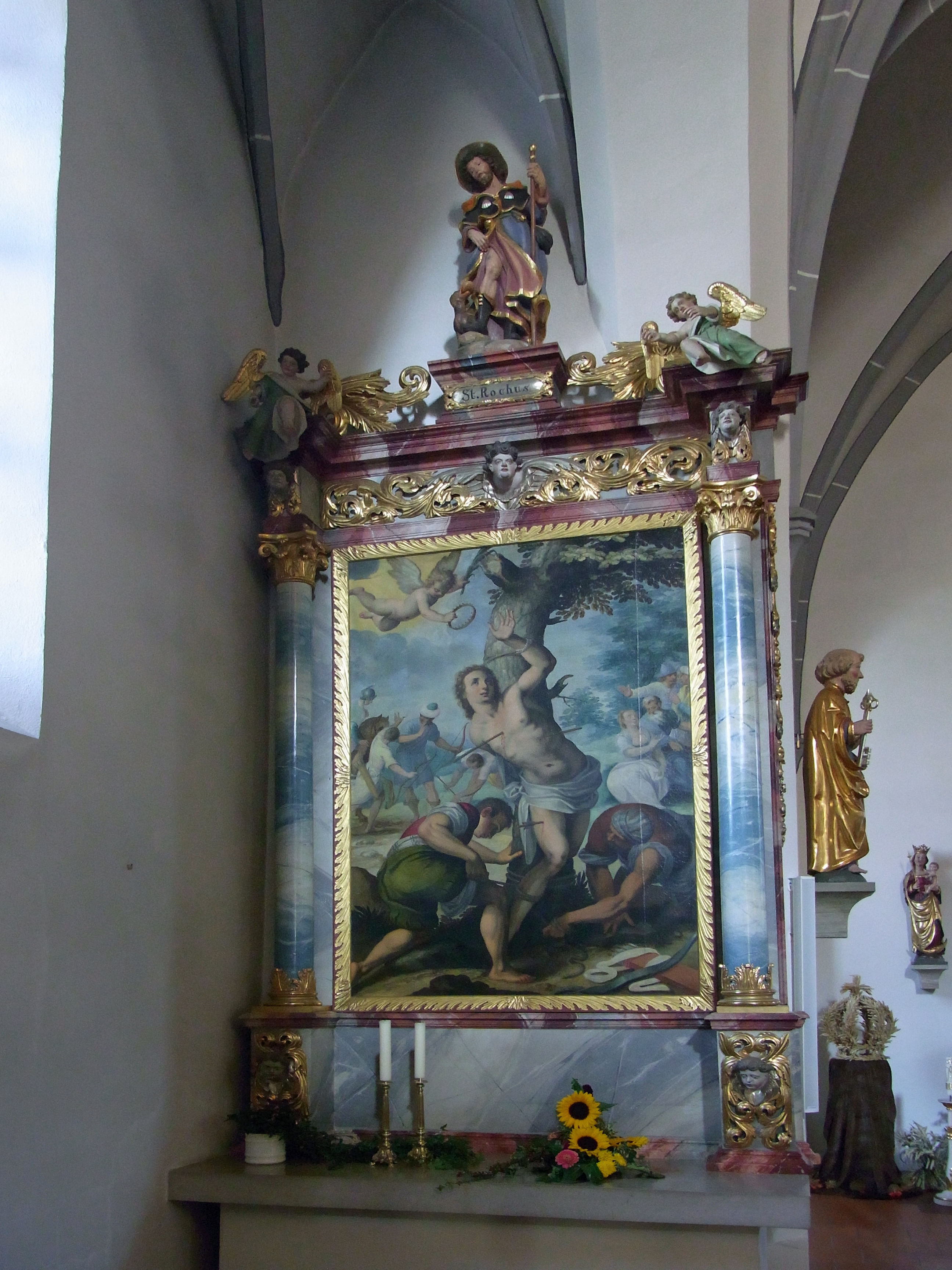 Neufra (Riedlingen) Pfarrkirche St. Peter und Paul